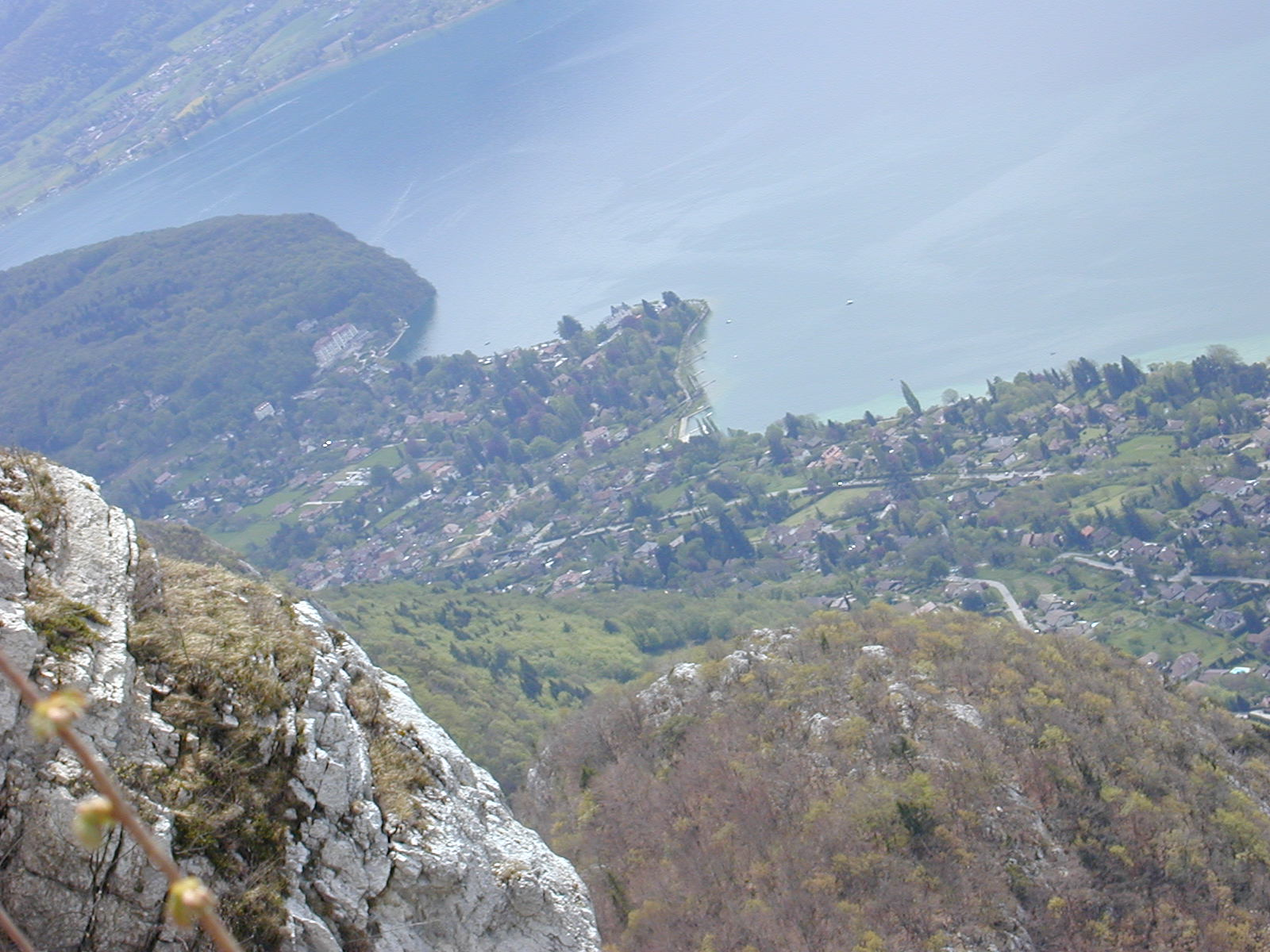 Lac d'Annecy, vu depuis la falaise du mont Veyrier. En bas Menthon-Saint-Bernard et le début du Roc de Chère.